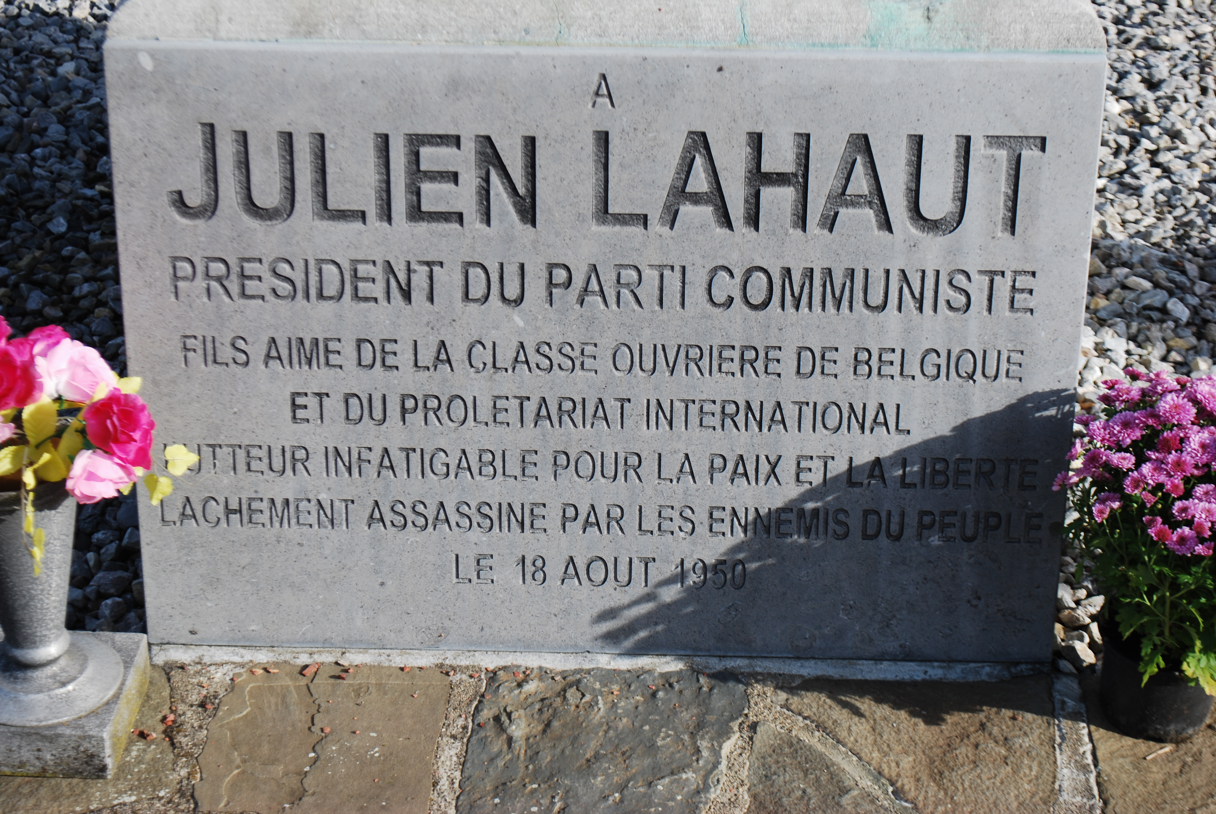 Vue du quartier des Biens Communaux, à Seraing (Belgique).